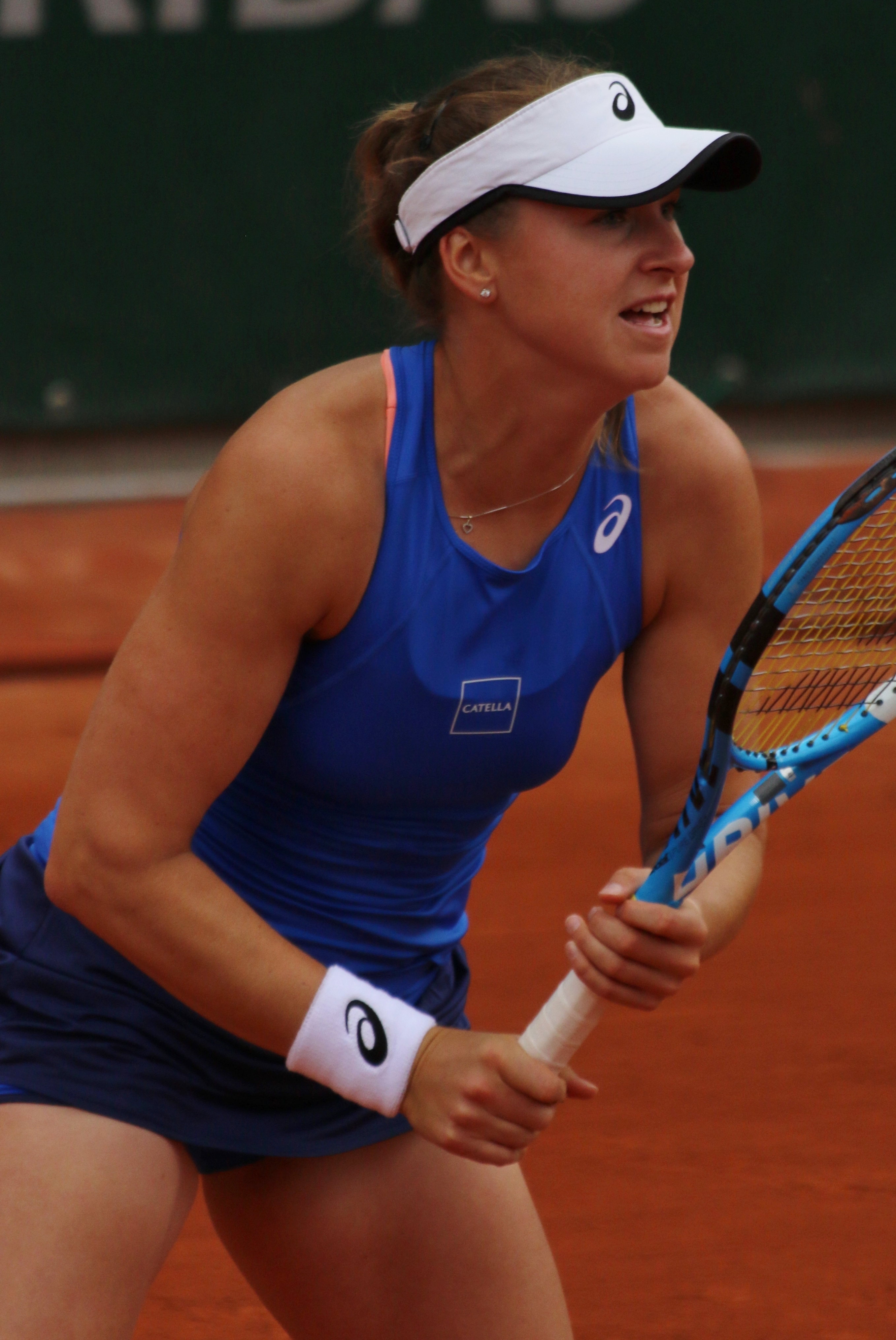 Peterson RG19 (6)